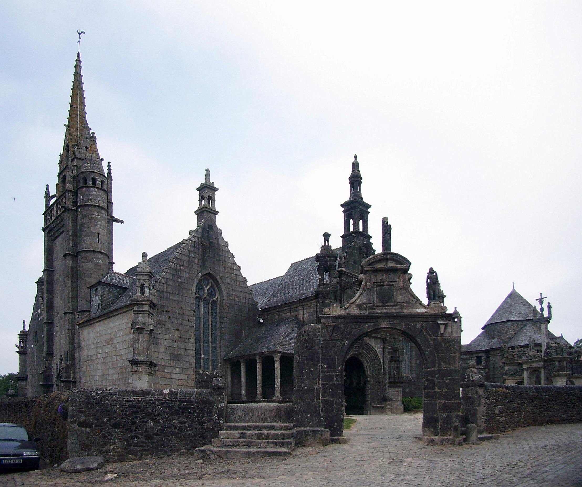 Der Umfriedete Pfarrbezirk von Guimiliau, Bretagne, Frankreich